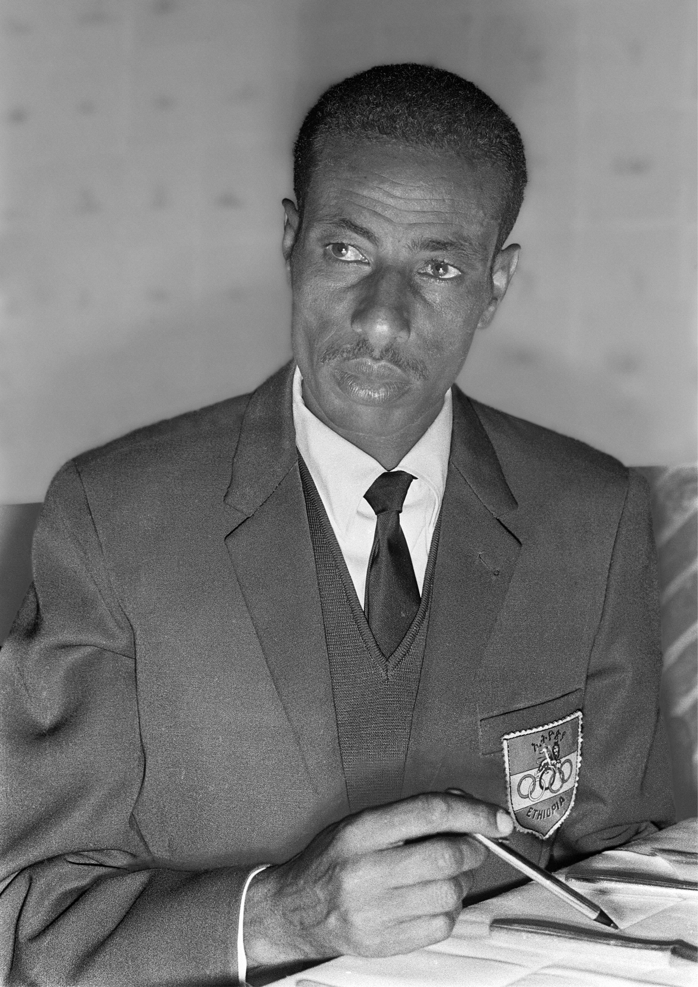 Abebe Bikila